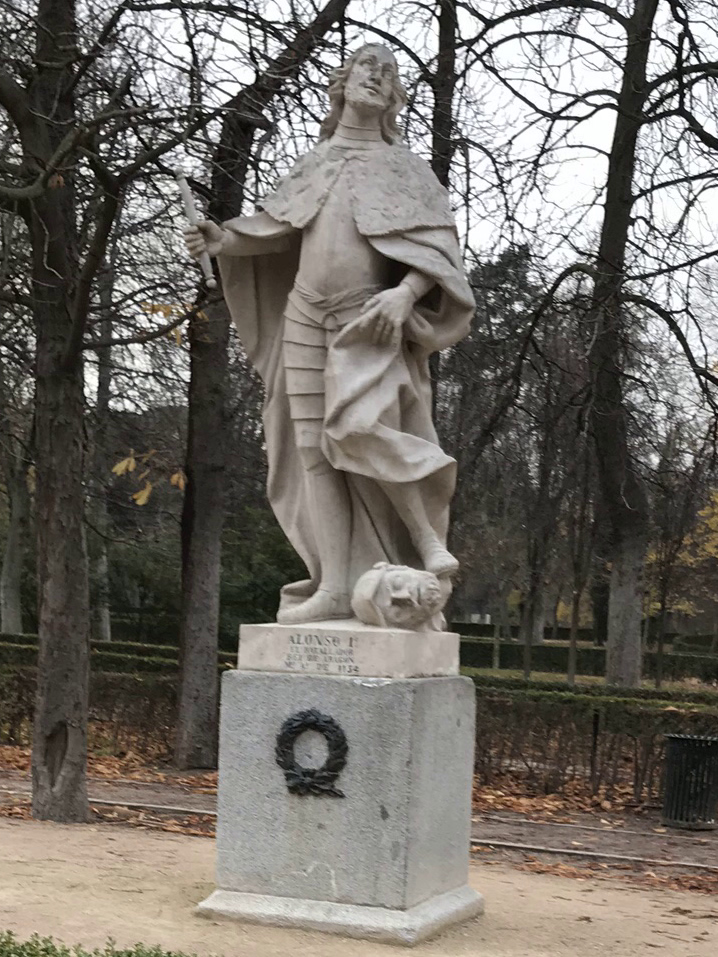 Alfons I. König von Aragón, Statue im Retiro-Park in Madrid.